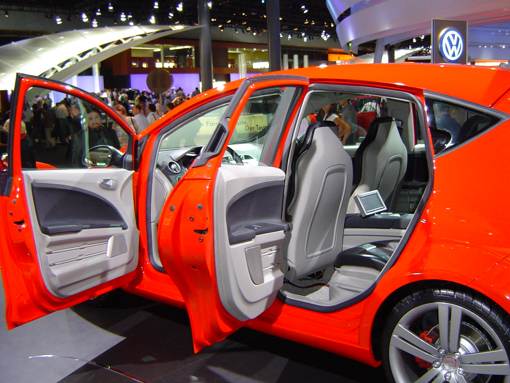 IAA_2003_096